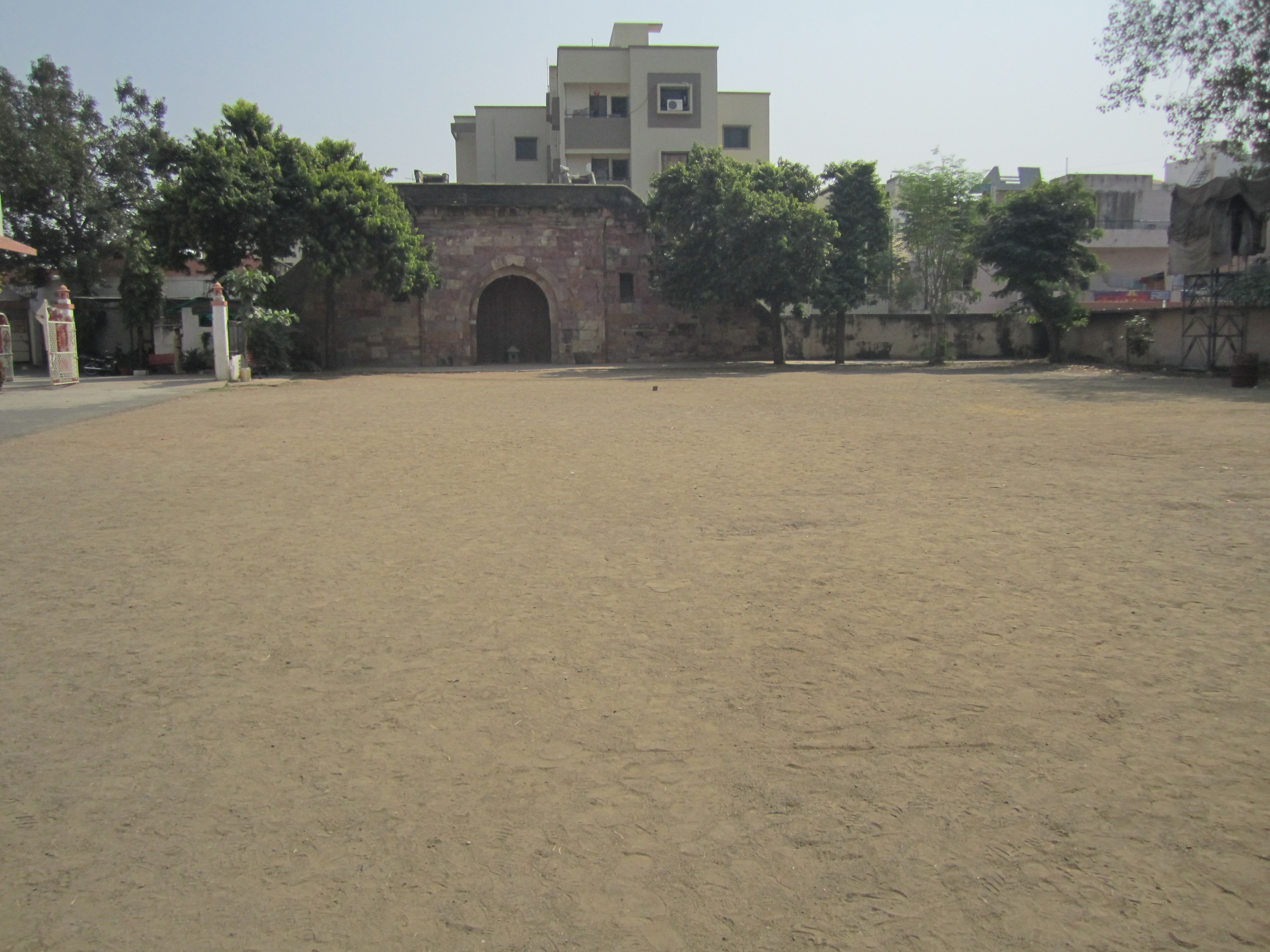 राष्ट्रीय स्वयंसेवक संघ main office where first meeting took place